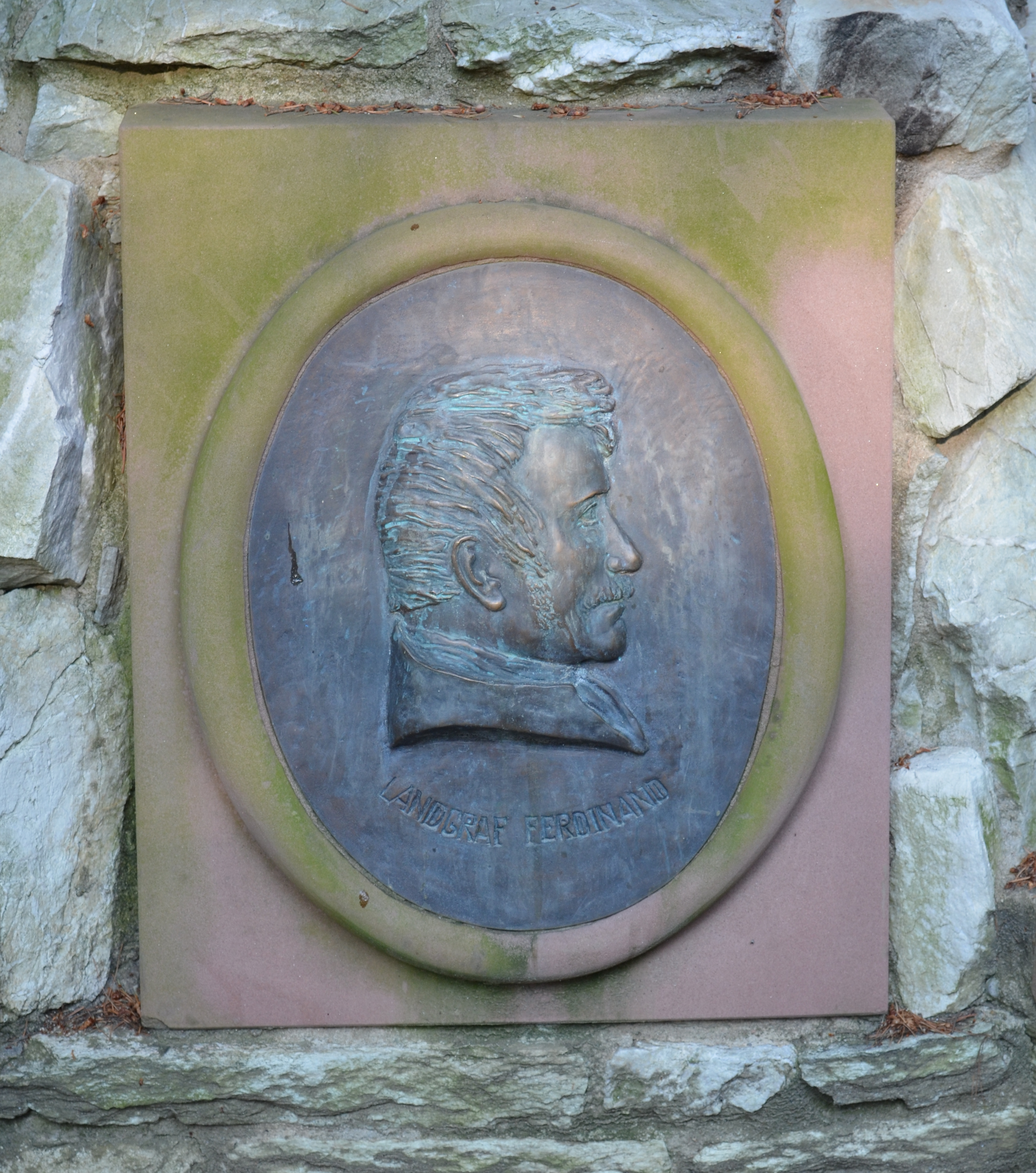 Bad Homburg, Landgrafendenkmal, Tannenwaldallee, Landgraf Ferdinand